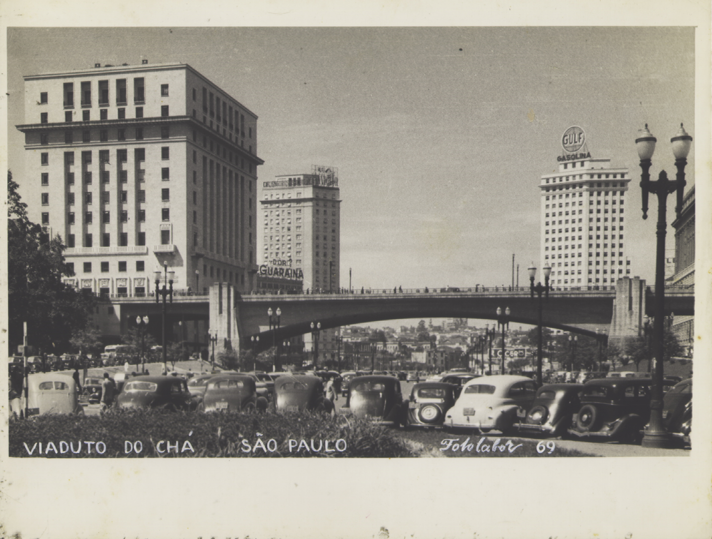 Obra que integra o acervo do Museu Paulista da USP. Coleção Werner Haberkorn